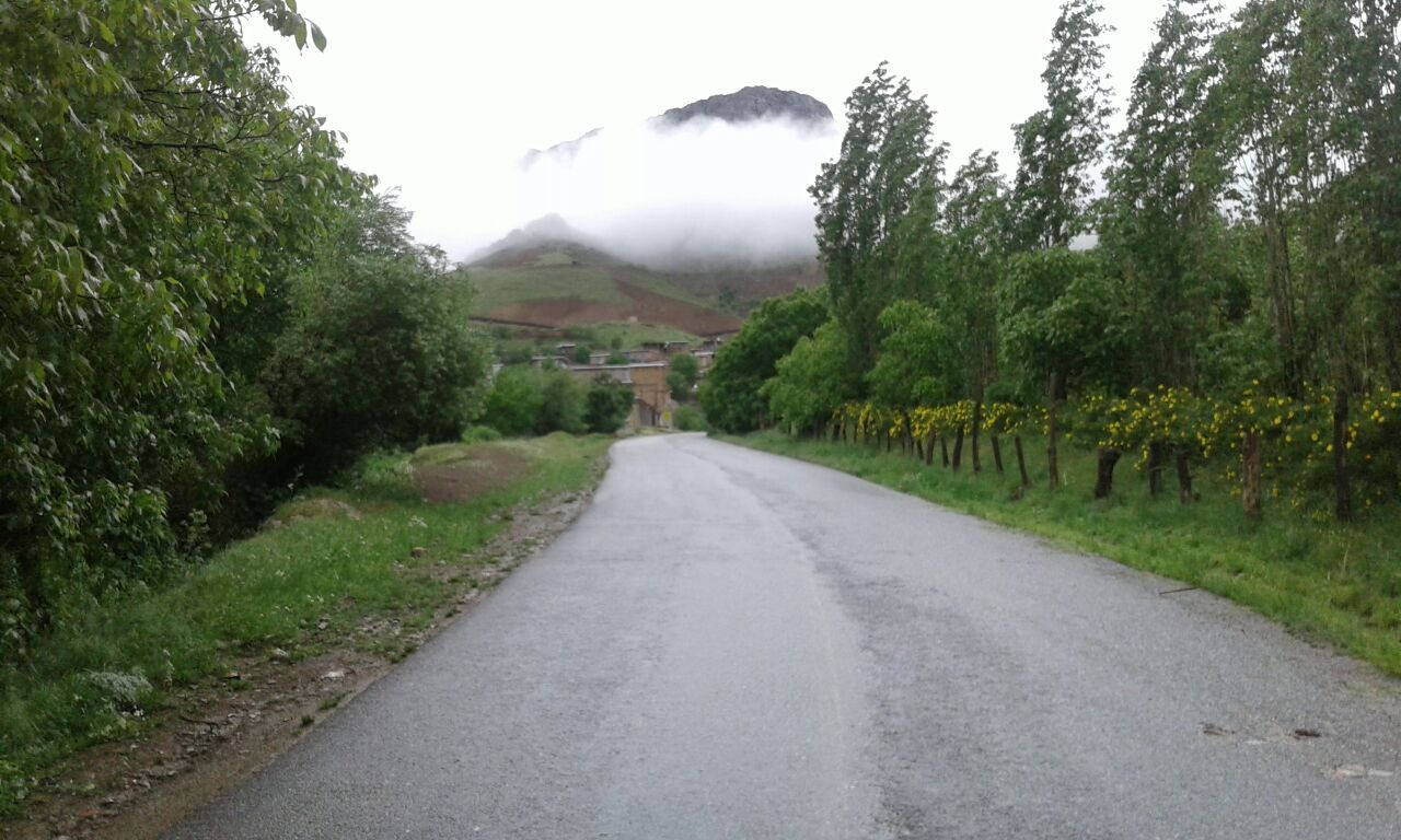 تخت زنگی در بهار 1396